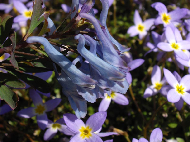 Corydalis flexuosa 'China Blue'